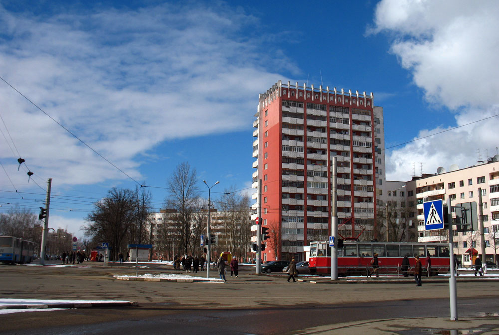 Crossroad at Maskoŭski ave in Viciebsk